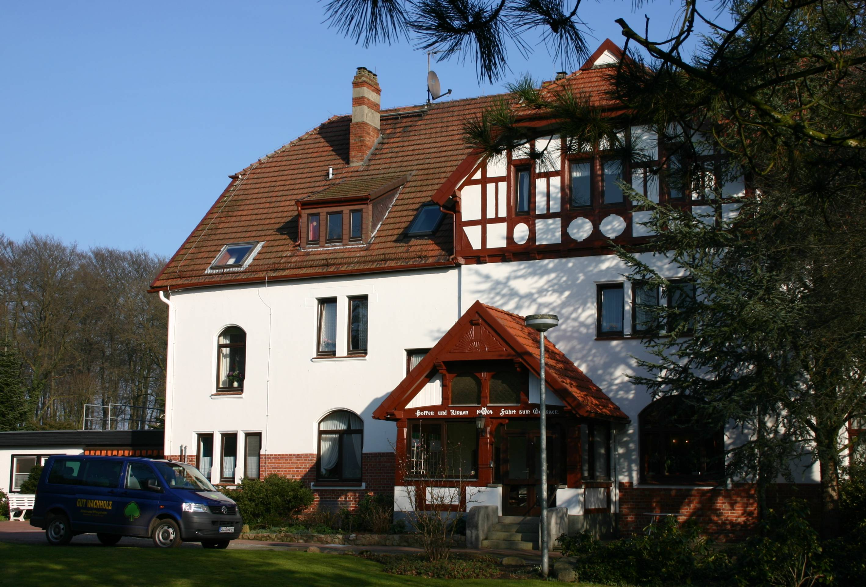 Gut Wachholz / heute Altenheim